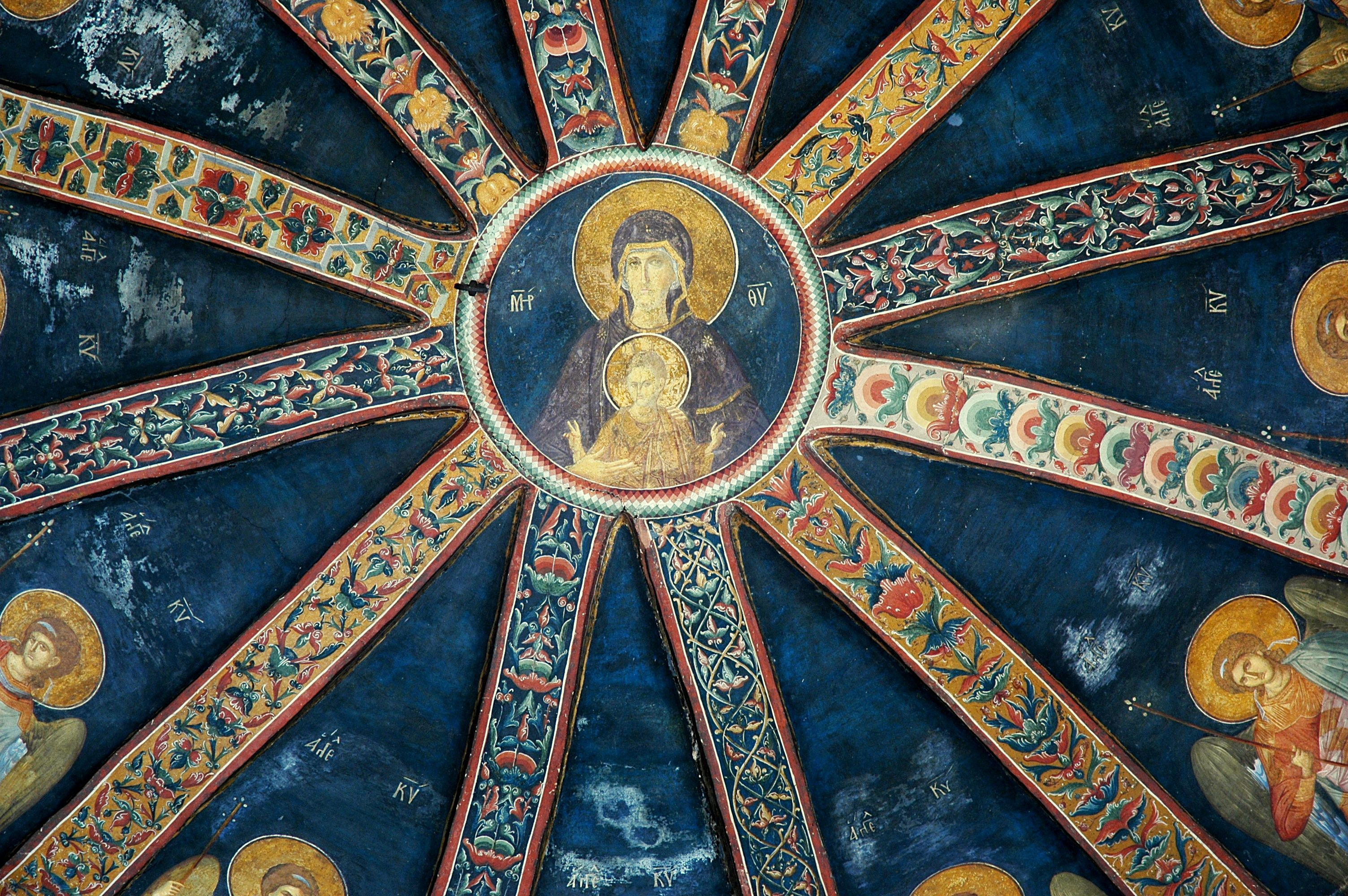 Sant Salvador de Khora - Cúpula de Parecclesion